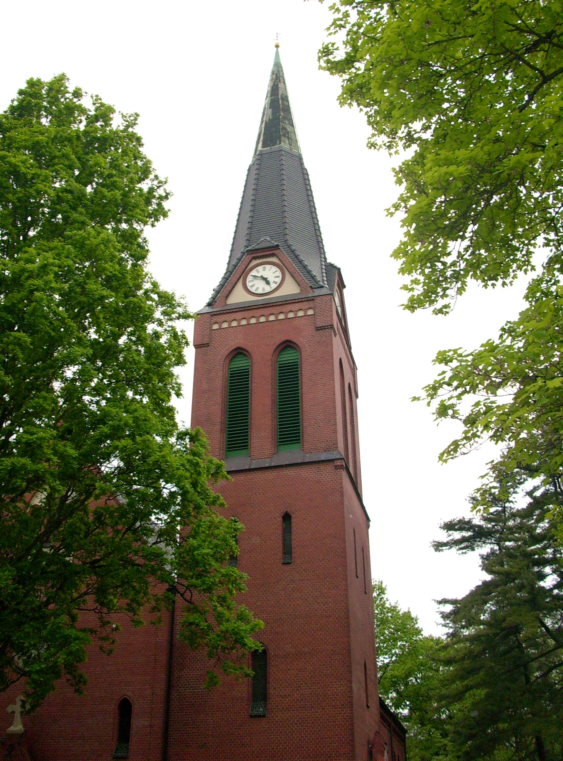 evangelische Johanneskirche von 1905, Dresdener Straße in Bernsdorf (Oberlausitz)